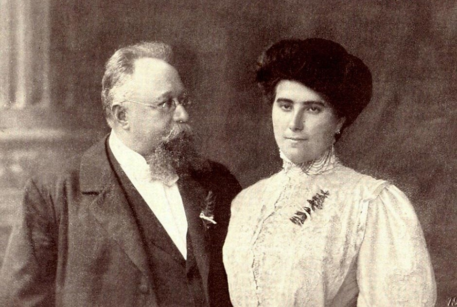 Václav hrabě z Kaunic se svou druhou manželkou Josefinou, roz. Horovou